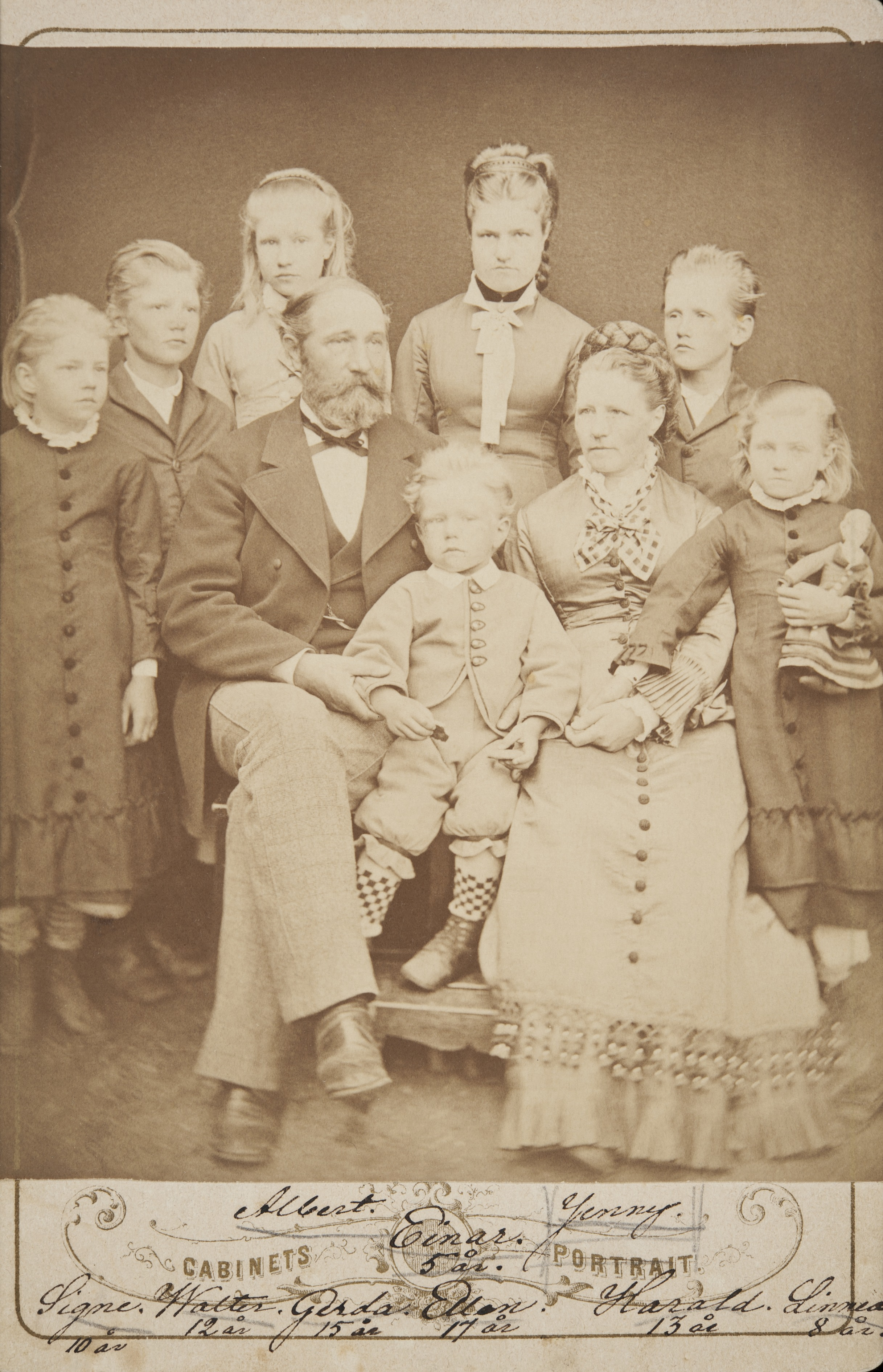 Signe Branderin perhe; Signe Branderin perhe. Kuvassa vasemmalta Signe (10 år), Walter (12 år), Gerda (15 år), Ellen tai Ellan? (17 år), Harald (13 år), Linnea (8 år), isä Albert (s.1827) ja äiti Jenny (s.1828), joiden sylissä Einar (5 år). -- digitaalinen kuva, paperi, mv